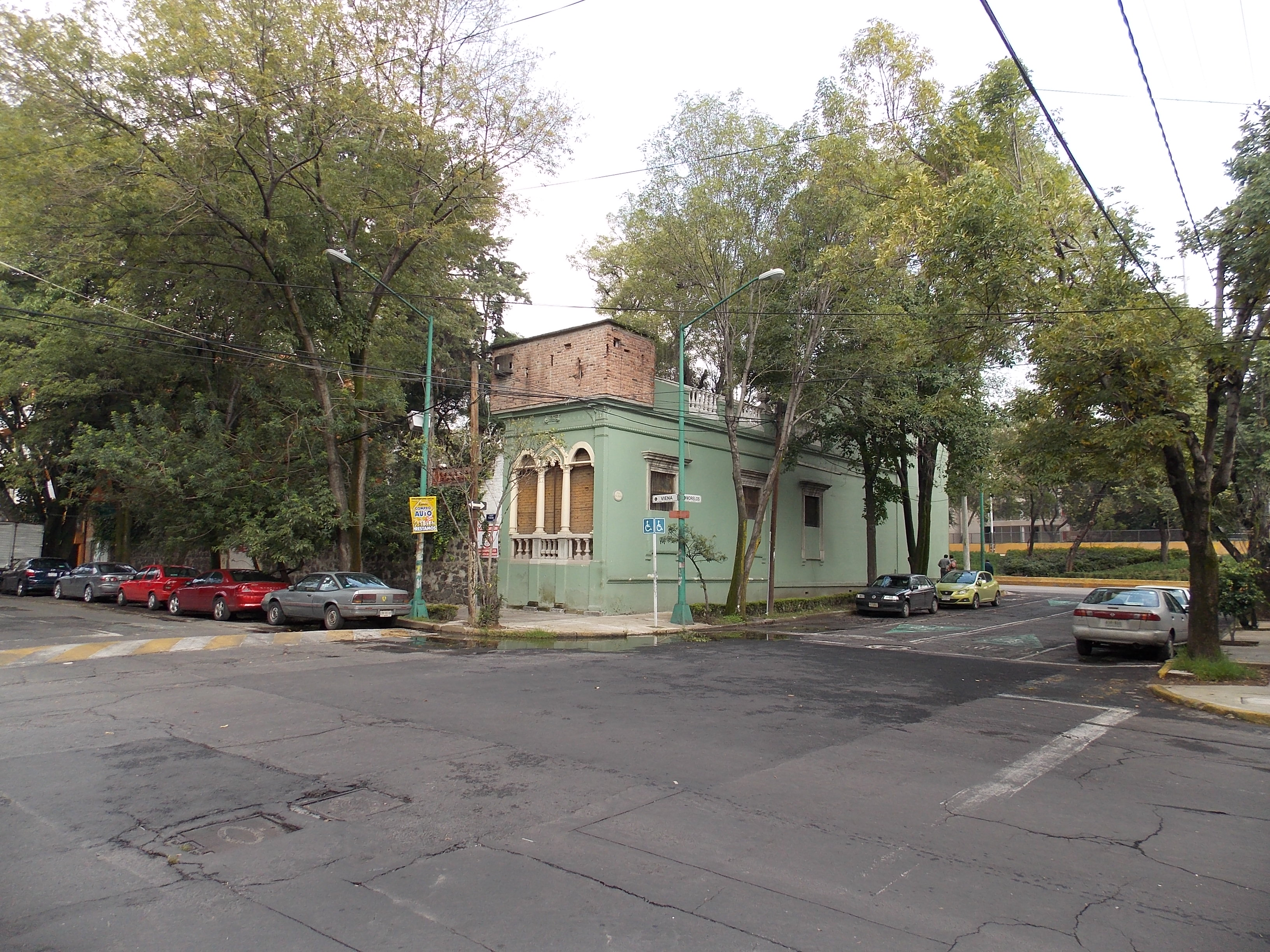 Vista actual de la esquina de las calles de Viena y Morelos